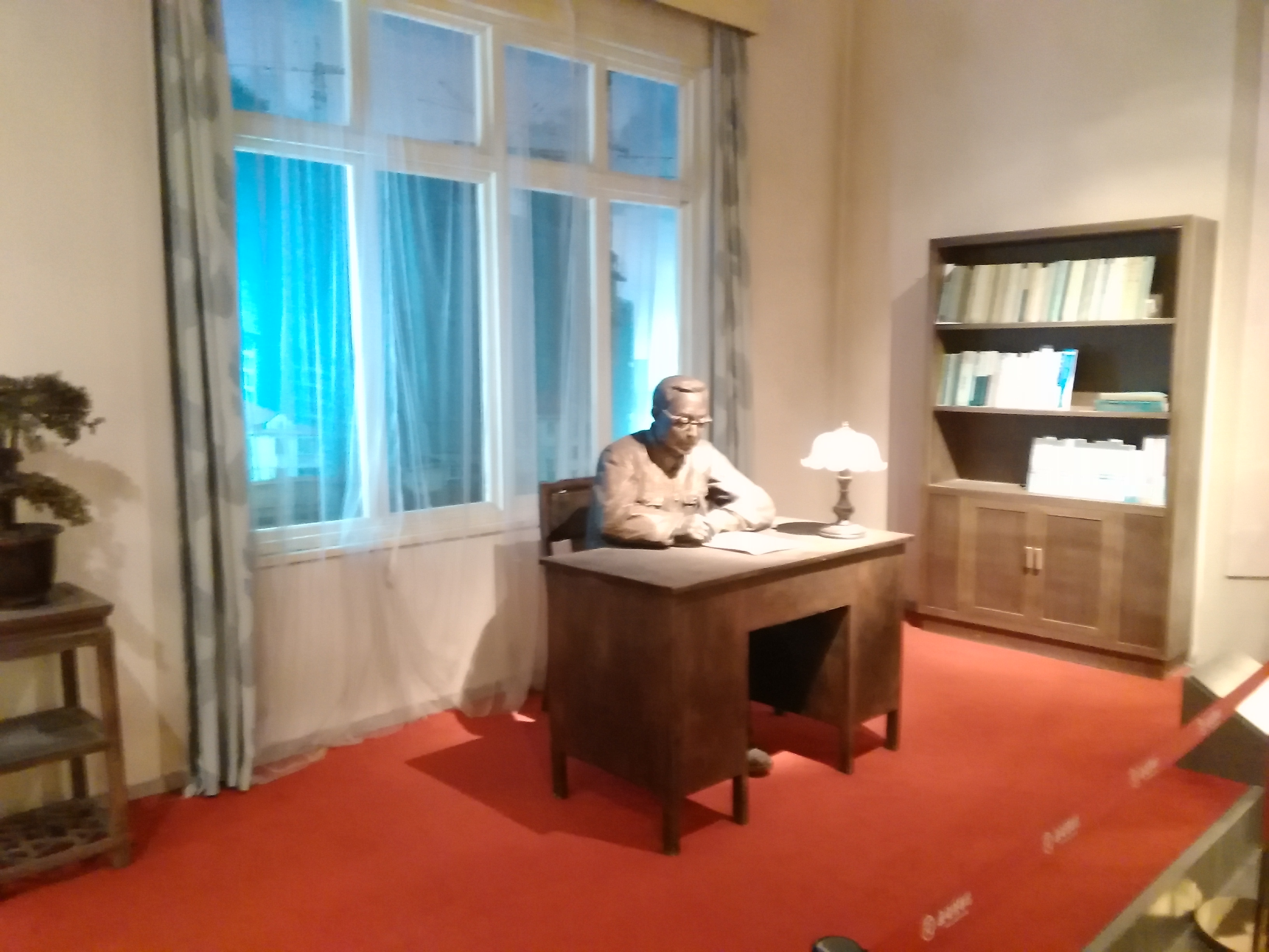 薛暮桥塑像，无锡博物院